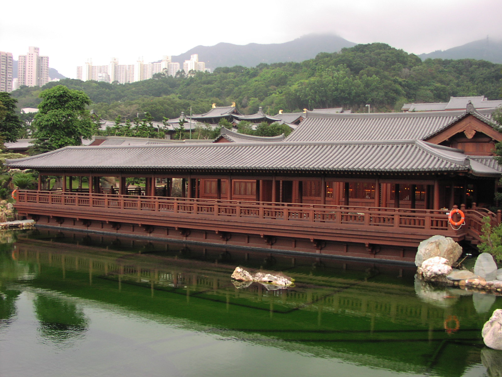 南蓮園池